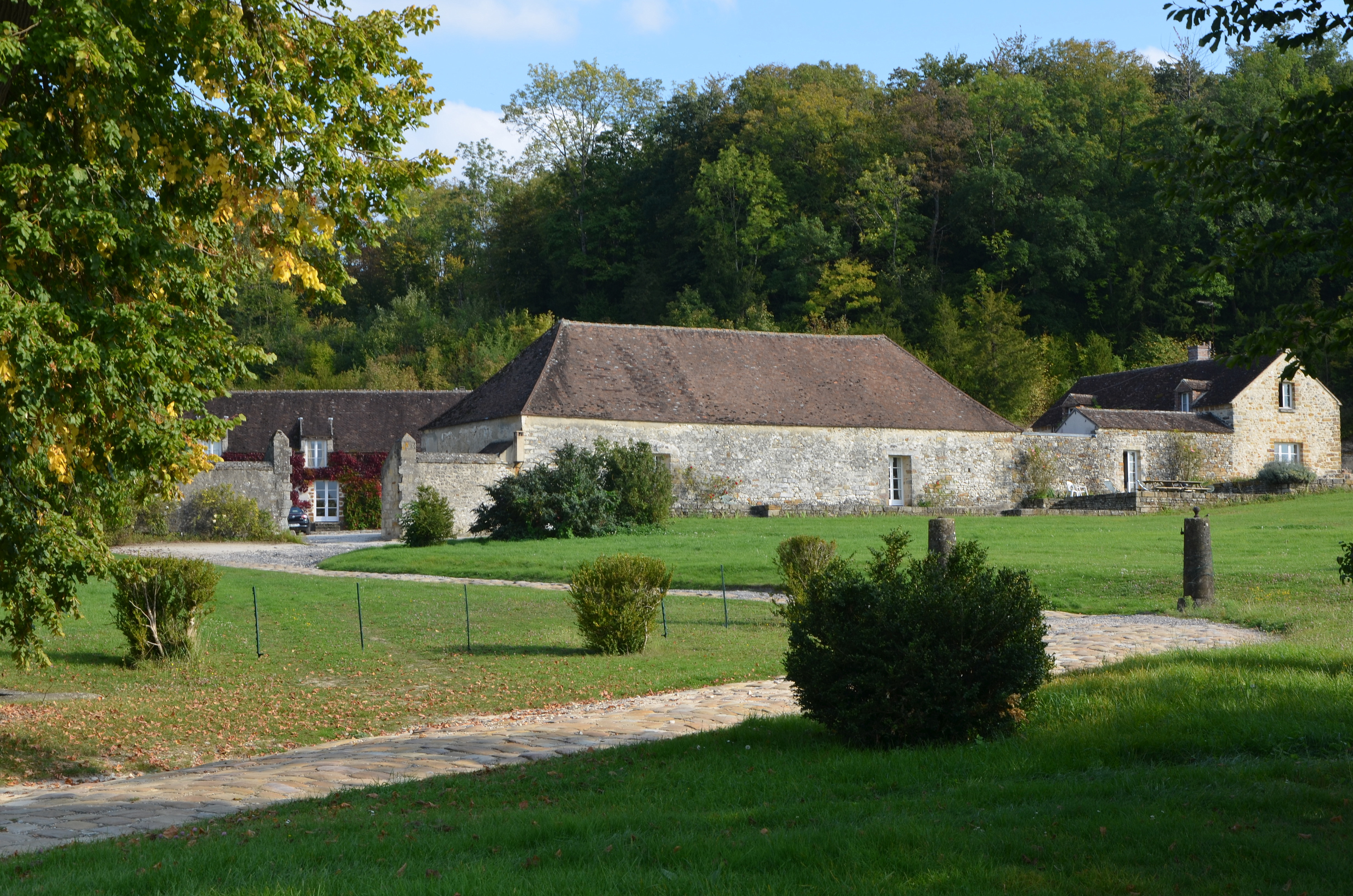 Ancienne ferme rattachee au chateau de Saint-Ange à Villecerf (Seine et Marne, France)